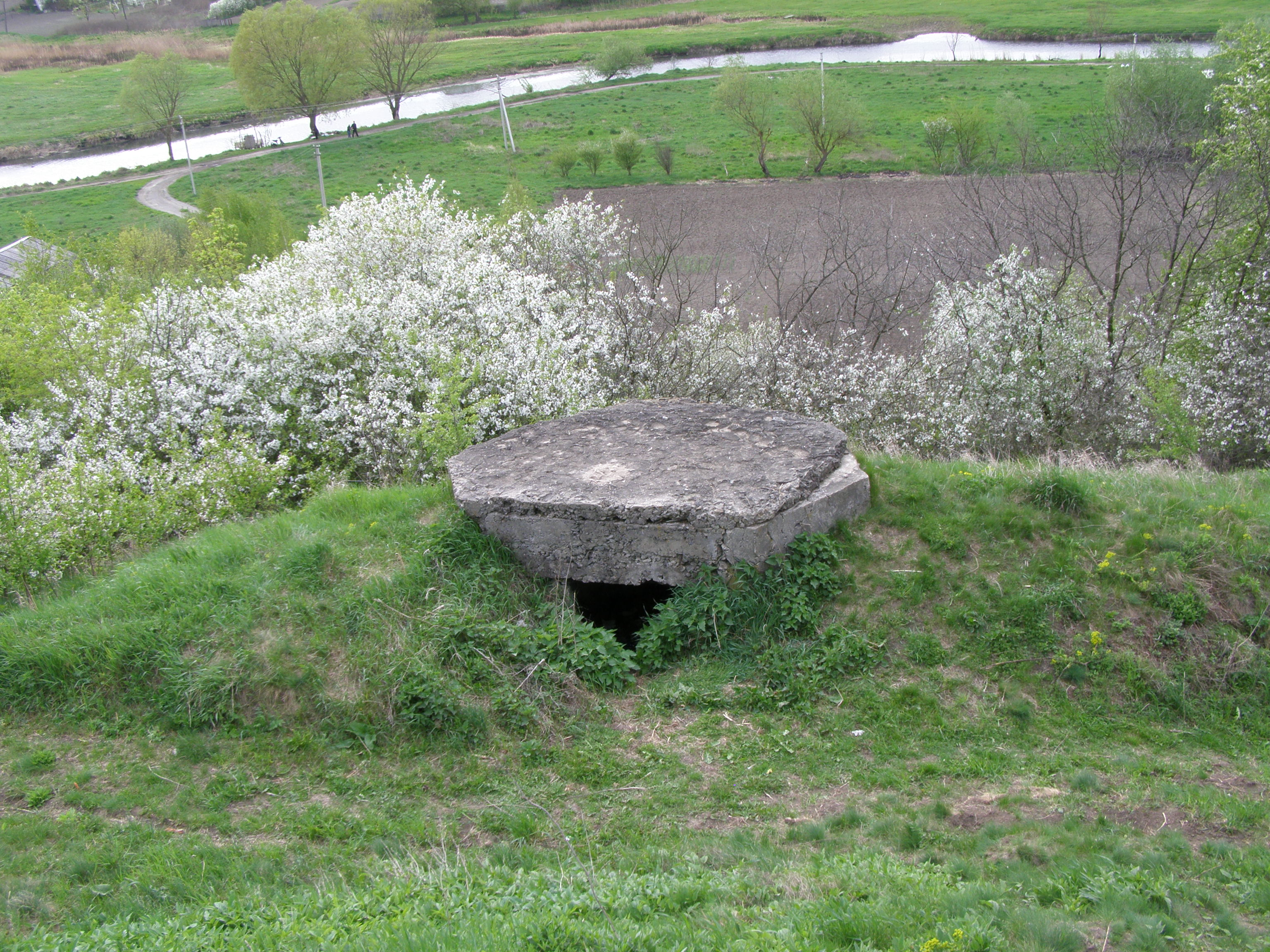 ДОТ №380, Київський укріпрайон